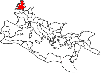 ブリタンニア属州の位置（120年頃のローマ帝国）.